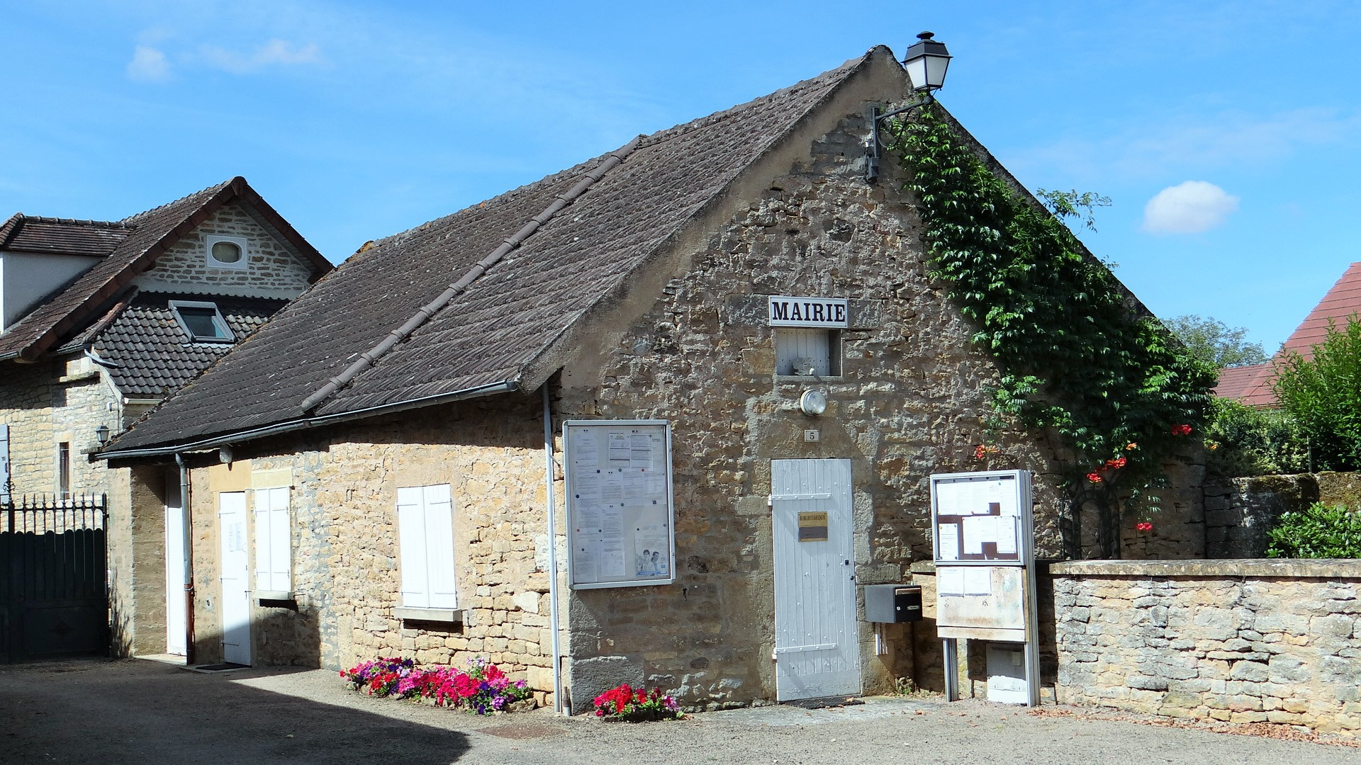 Mairie de Thisy